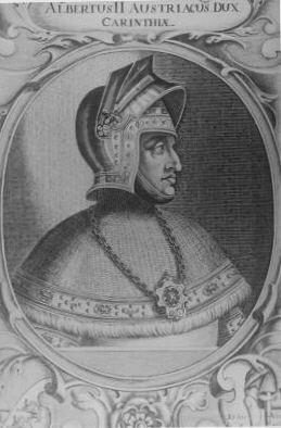 Herzog Albrecht II. Stich, 18. Jh.